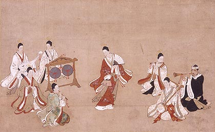 「琉球人舞楽之図」，御座楽（うざがく）（琉球の室内楽）の様子を描いている。